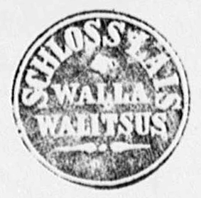 Laiuse vallavalitsuse pitsat. Üleslaadija koopia ja töötlus